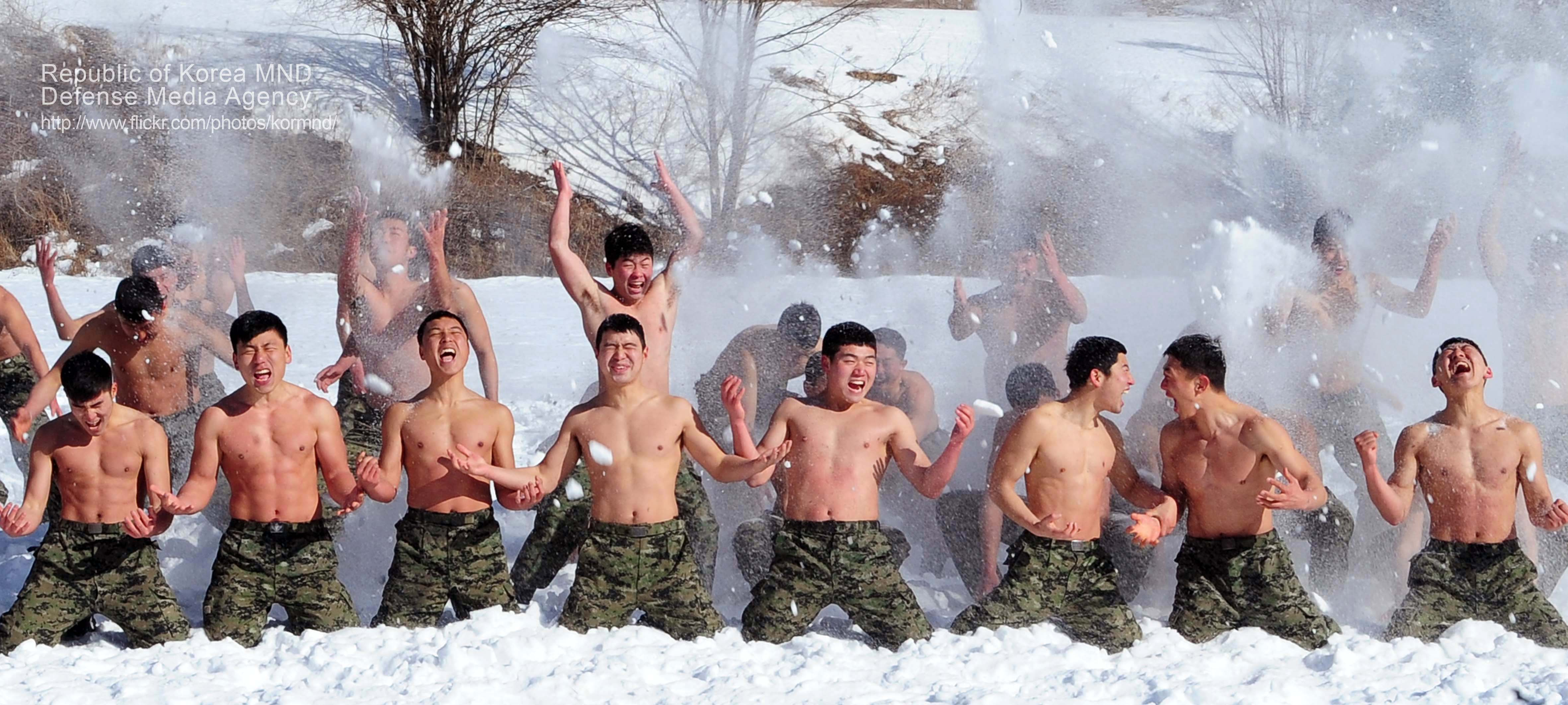 체감온도 영하 30도를 밑도는 9일 강원 황병산에 위치한 동계 전술 훈련장에서 육군 특수전 사령부 대원들이 강인한 전투의지와 자신감을 배양하기 위한 '설한지 극복 및 생존훈련'을 강도높게 펼치고 있다. 촬영 - 이헌구 기자